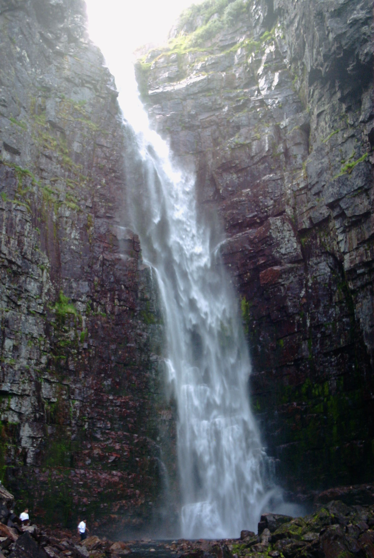 Njupeskär waterfall at Fulufjället National Park, Sweden